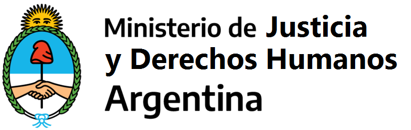 Ministerio de Justicia y Derechos Humanos